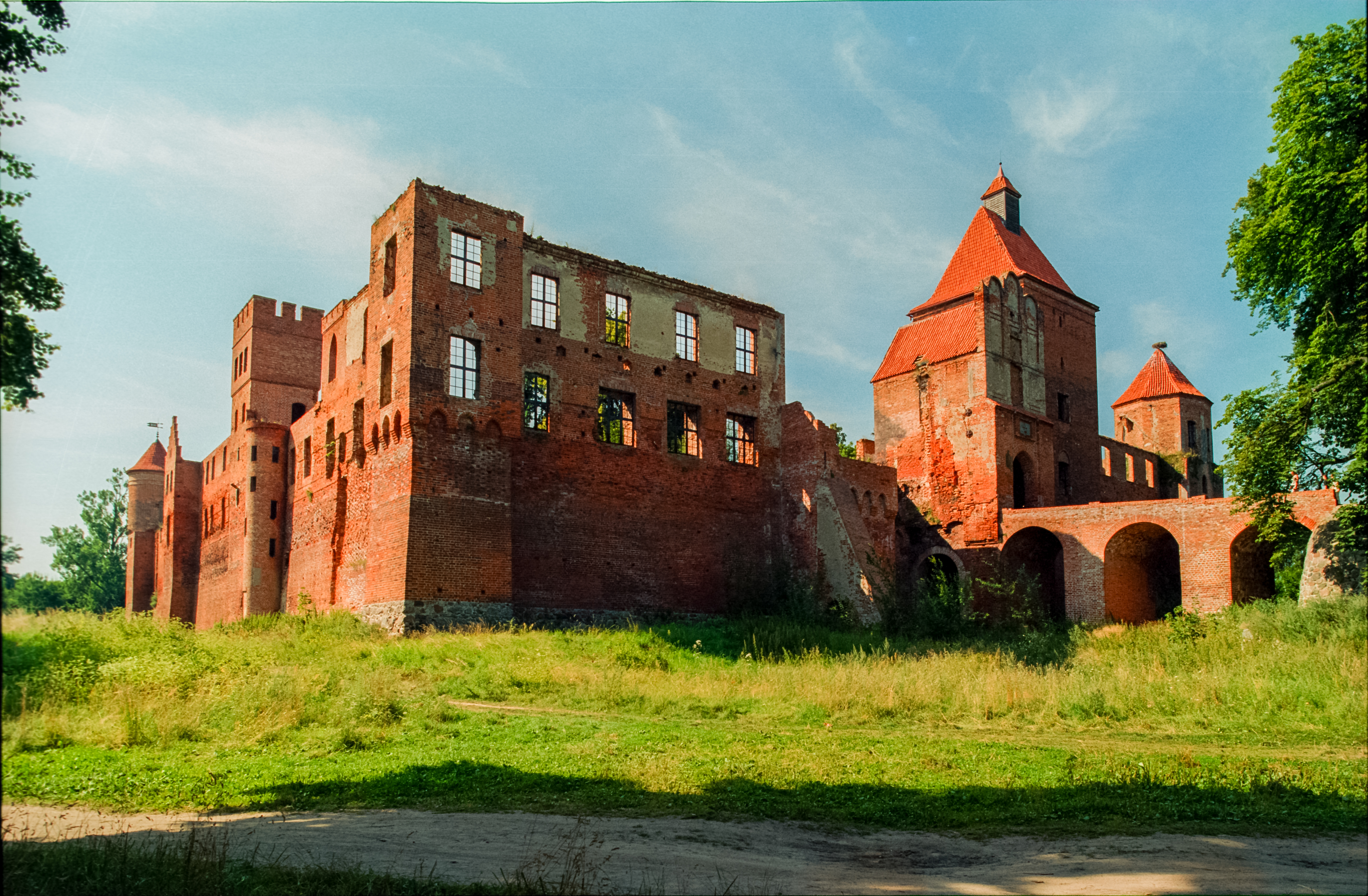 Szymbark Castle